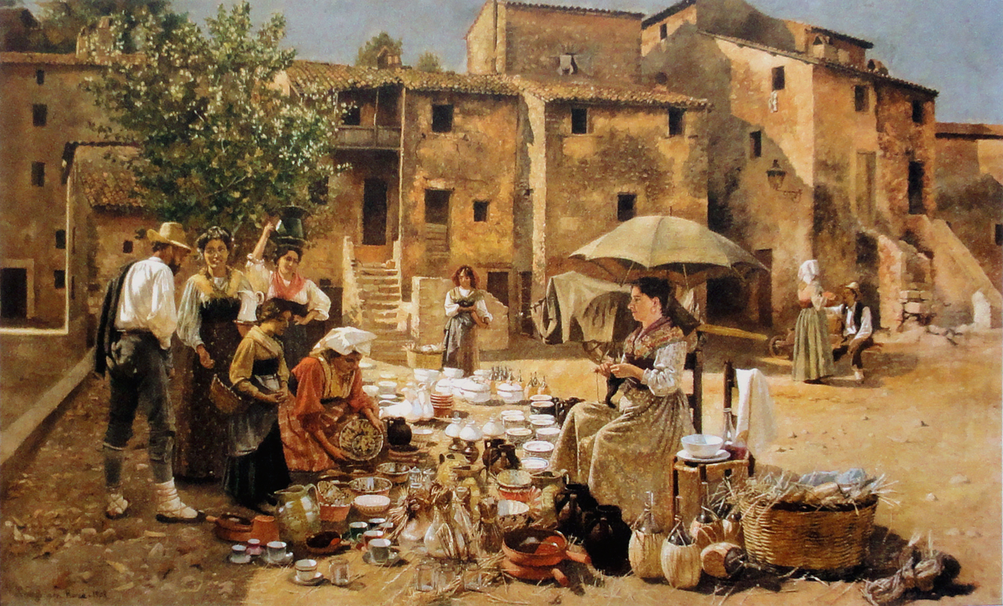 Feira de cerâmica em Anticoli, óleo sobre tela, 51 x 81cm, coleção particular